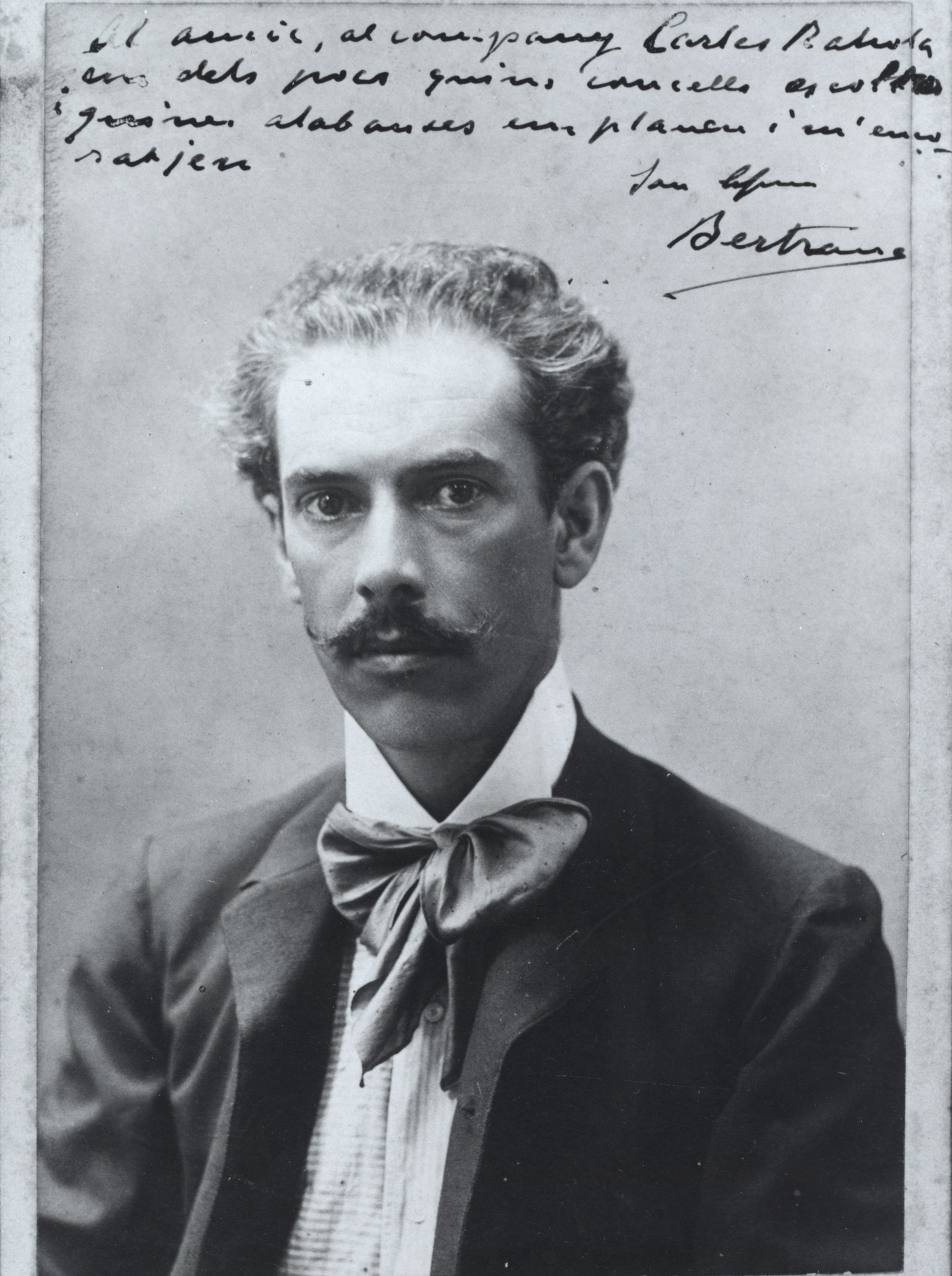 Retrat d'estudi de Prudenci Bertrana i Comte.